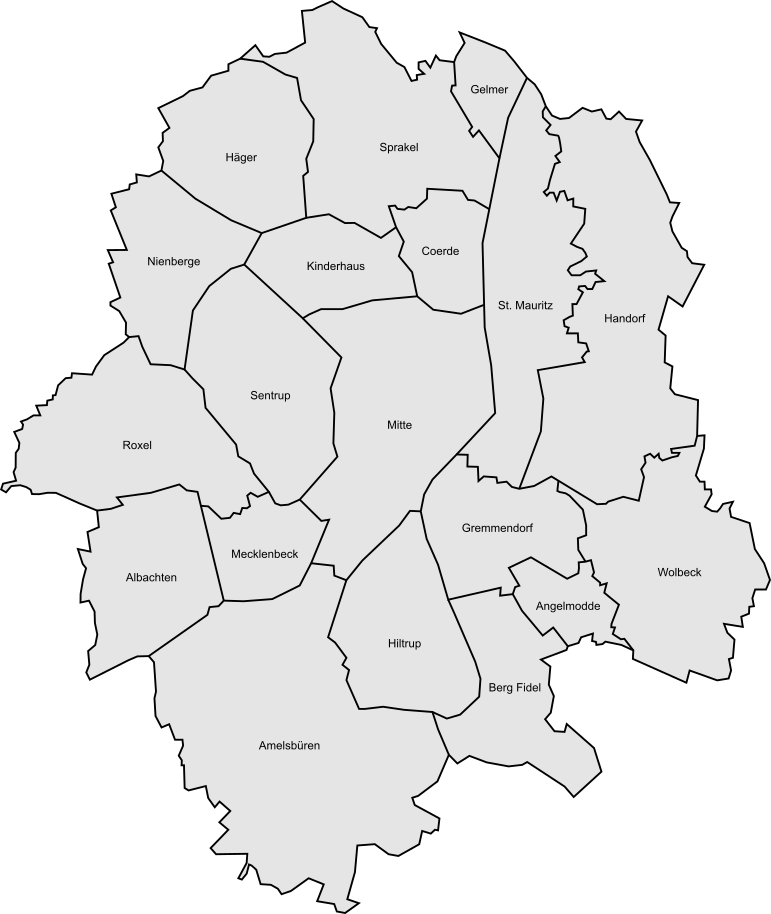 Münster Stadtteile